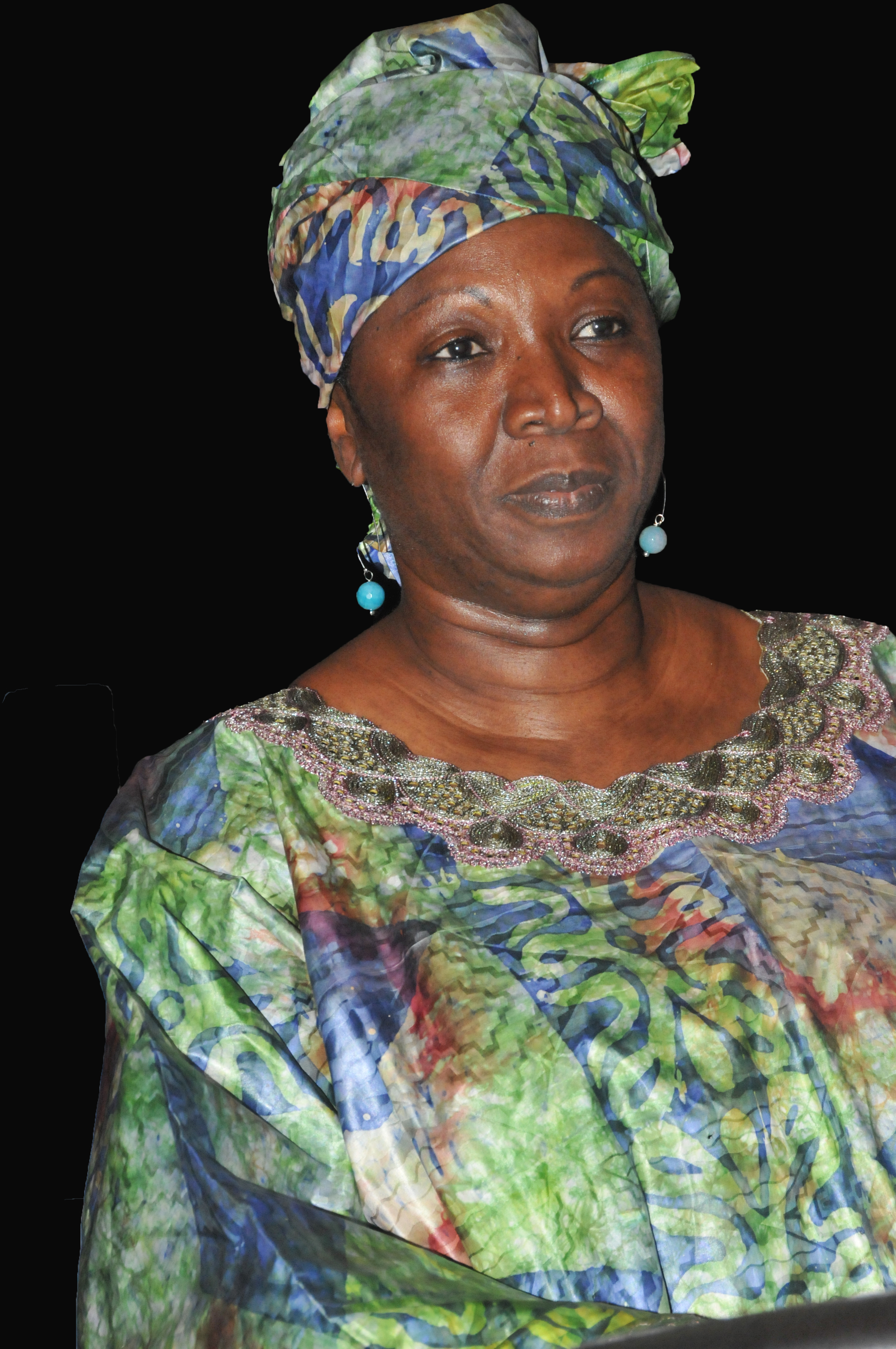 Mariam Sy Diawara, Présidente de la Maison de l'Afrique